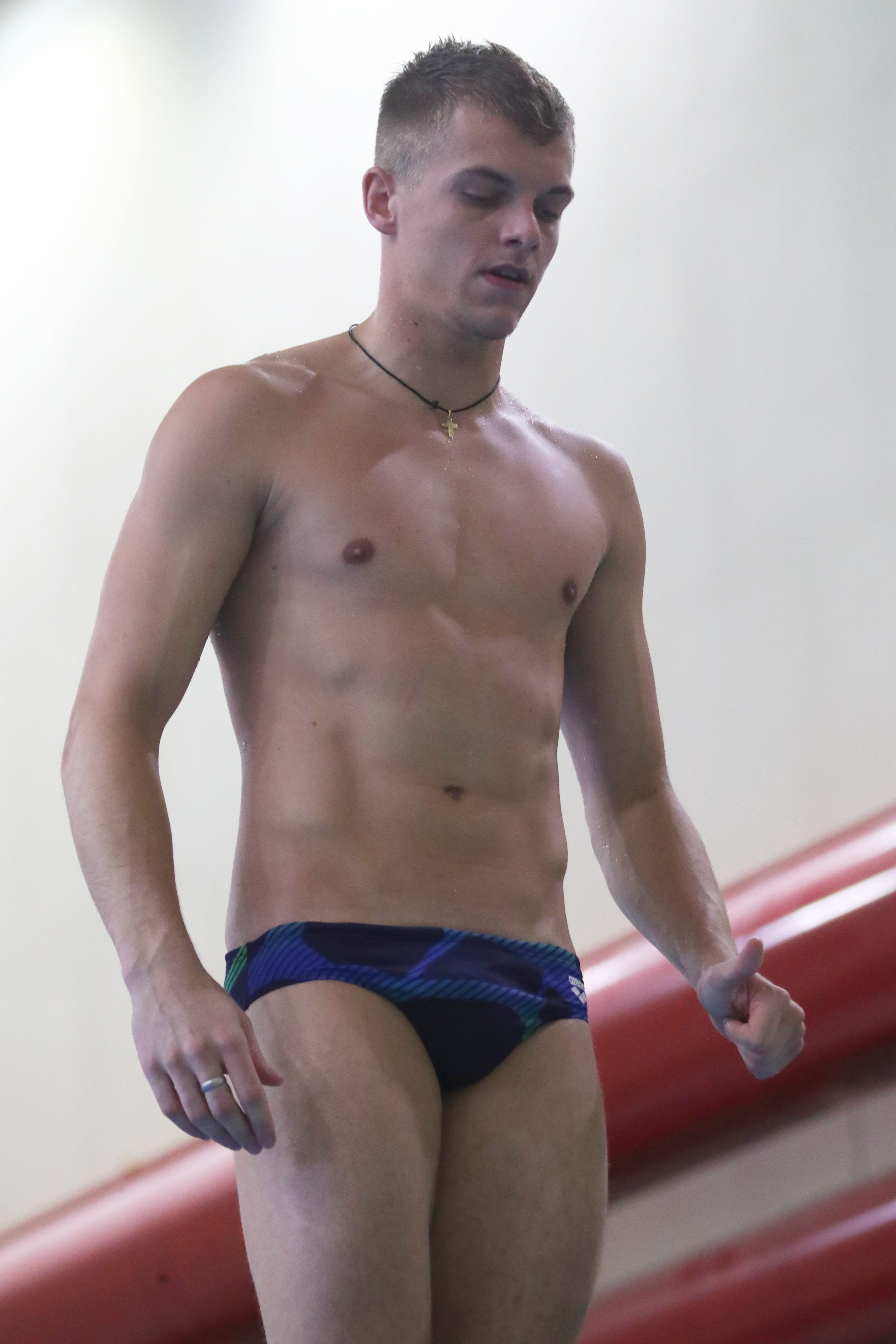 Training der Männer beim 47. Hallorenpokal im Wasserspringen in Halle (Saale) am 25. Januar 2020. Abgebildet: Timo Barthel.